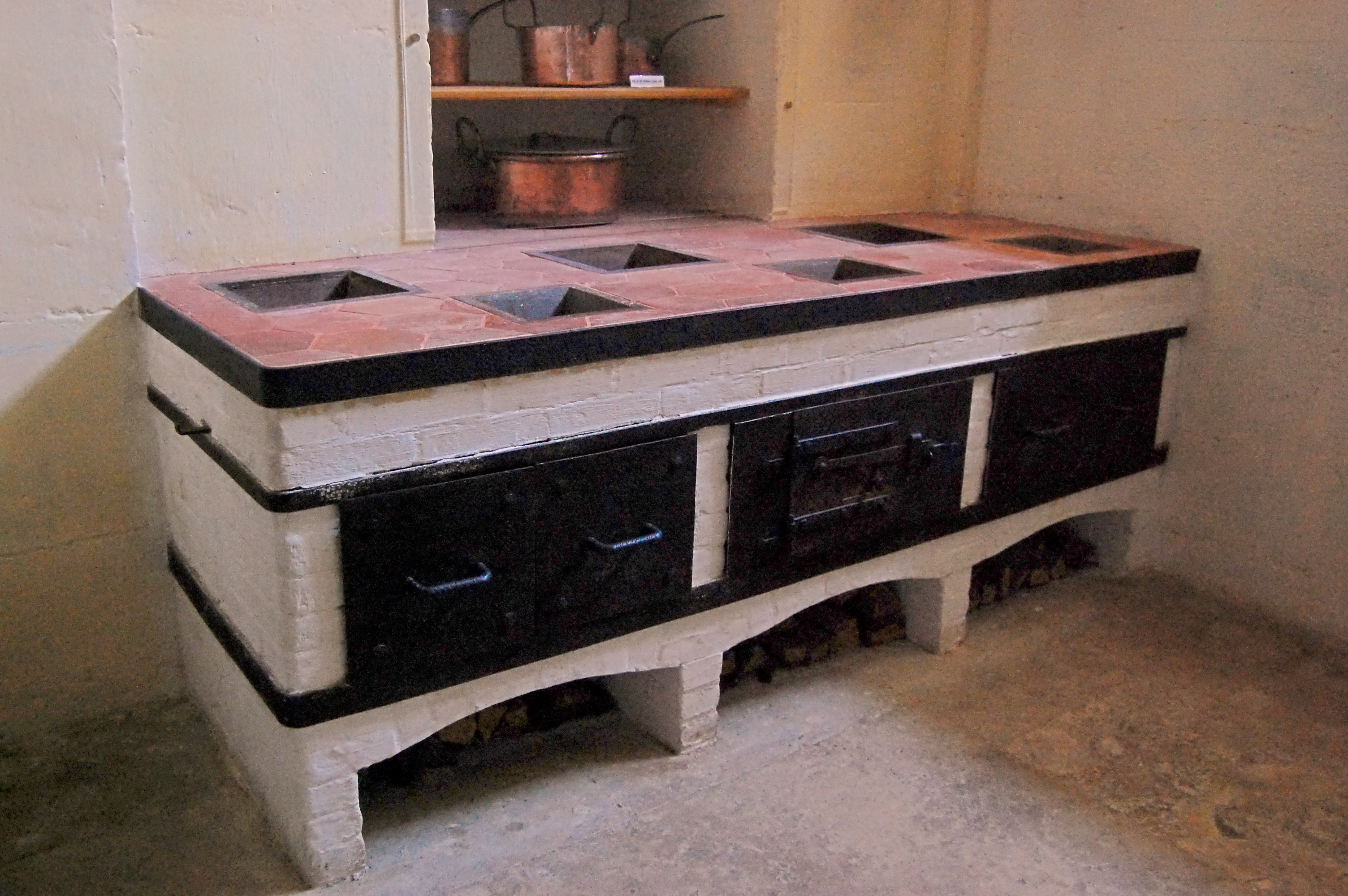 Réchauffoir du Petit Trianon, le fourneau